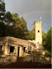 Haute Auberge